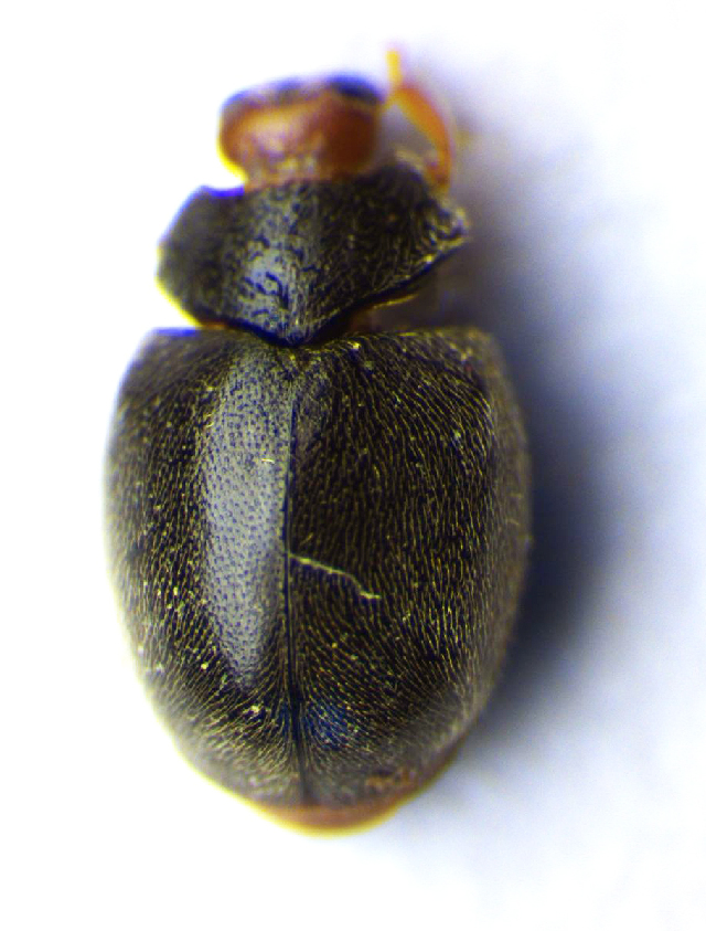 Scymnus auritus